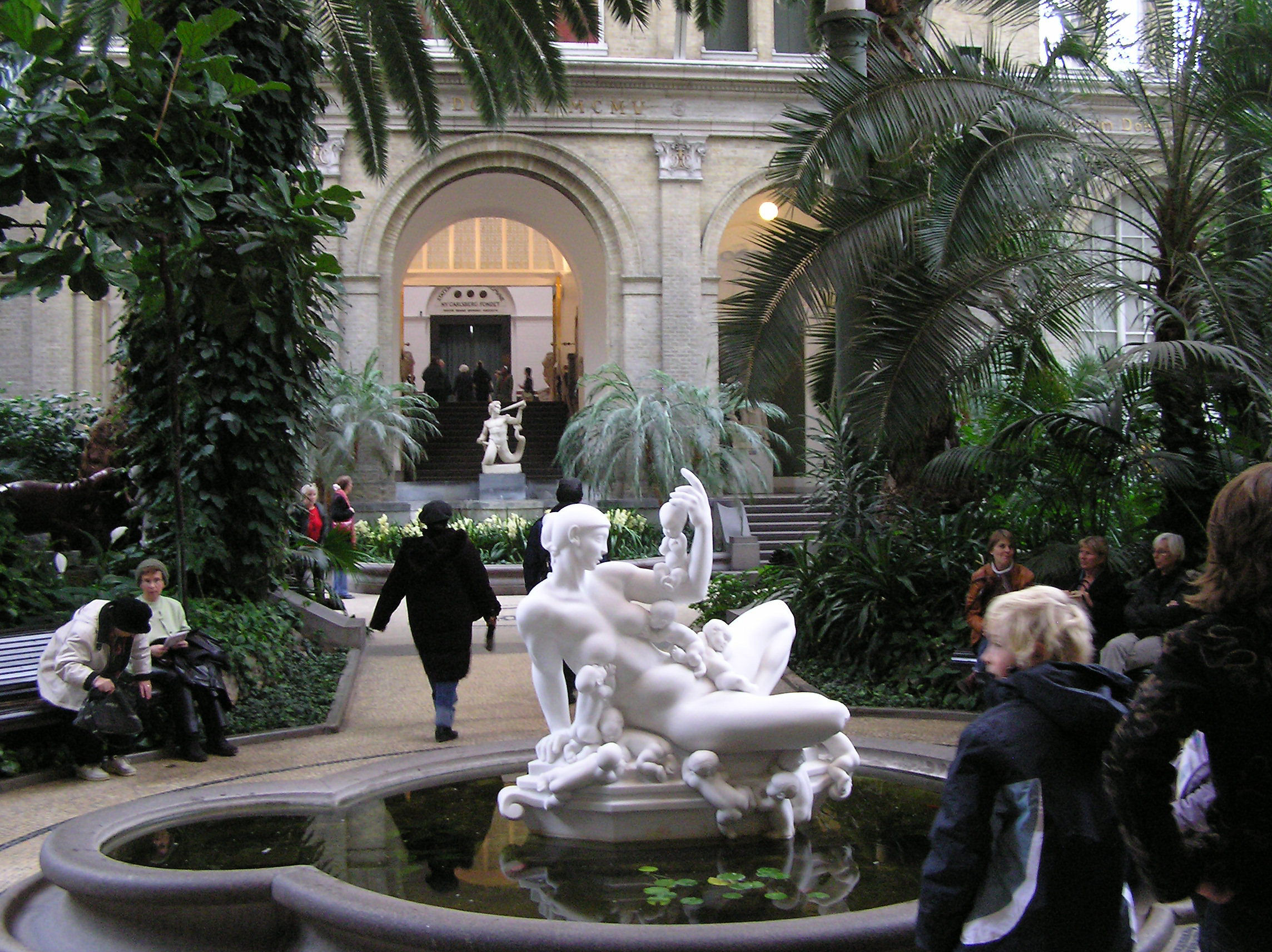 Glyptoteket, Palmehaven med Vandmoderen af Kai Nielsen